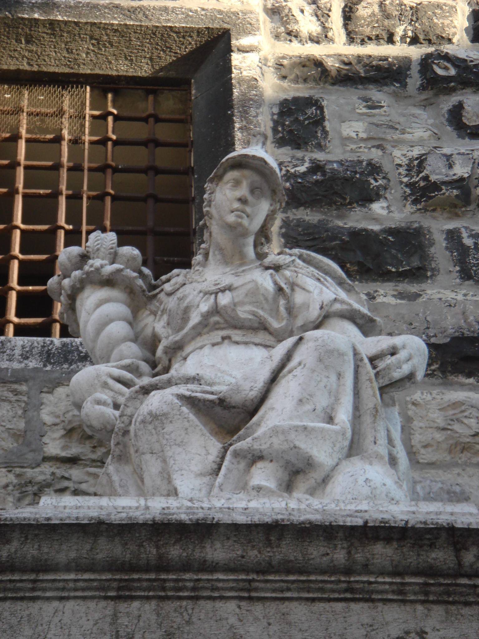 Pier Maria Bagnadore, Fontana della Pallata a Brescia, particolare, donna seduta armata e munita di cornucopia come allegoria di Brescia, 1596.